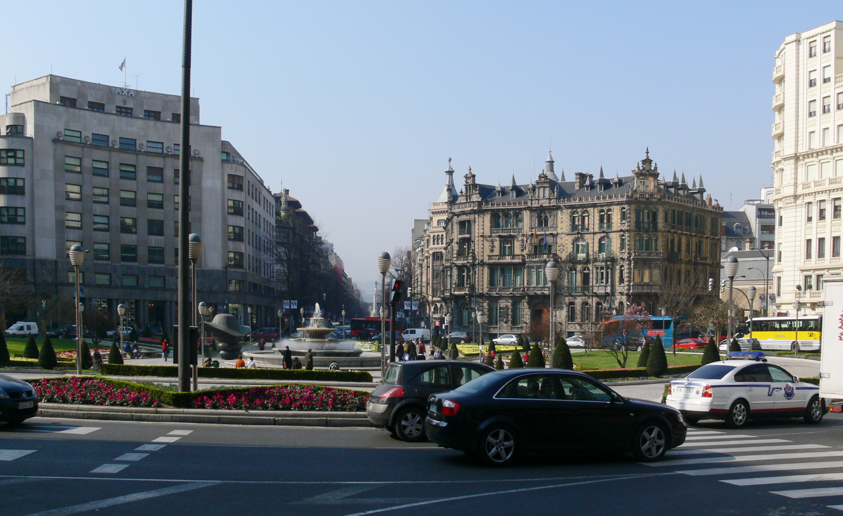 Plaza Moyúa (Plaza Elíptica), Bilbao